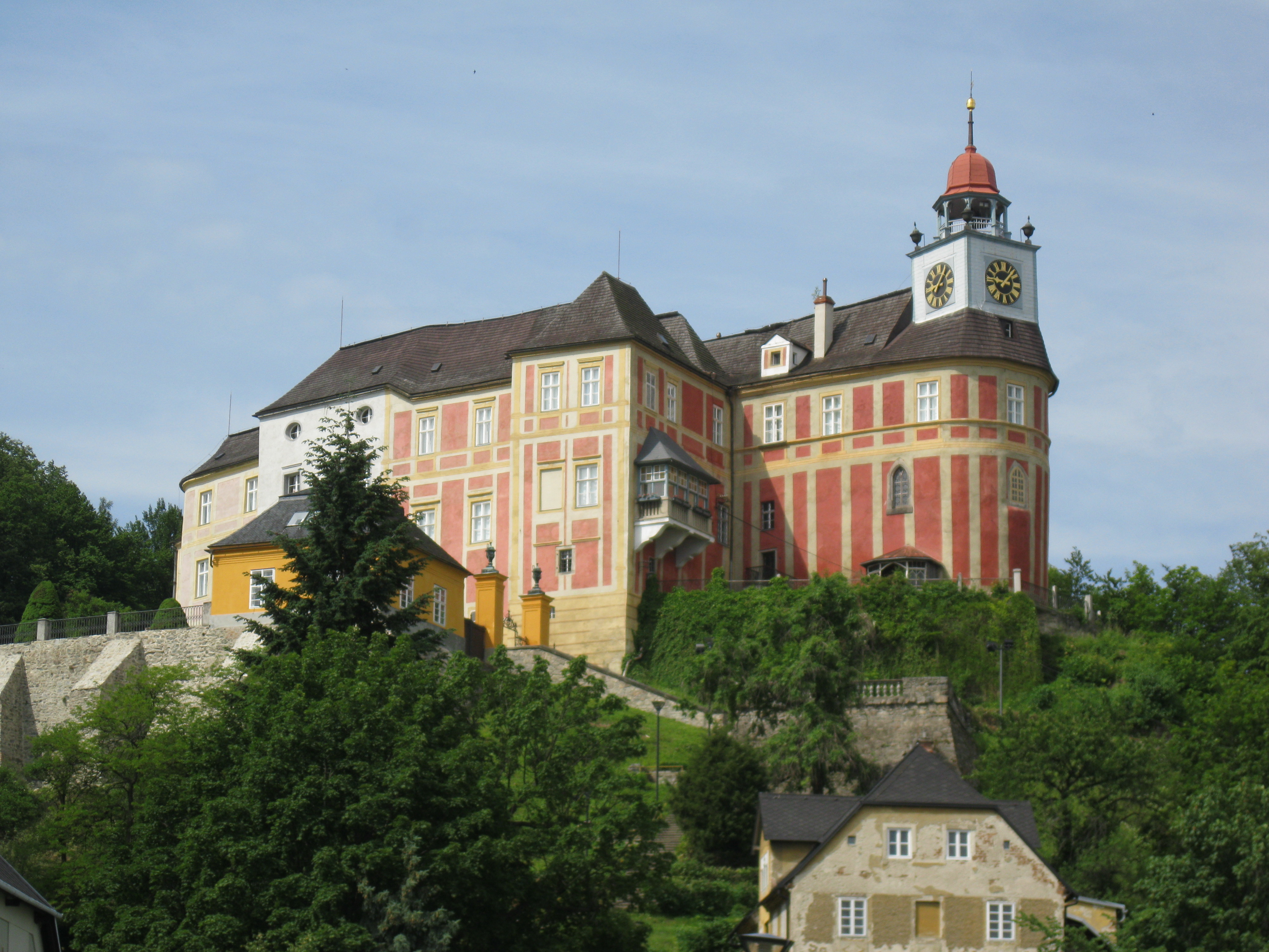 Zámek Jánský vrch Město Javorník, Město Javorník 1